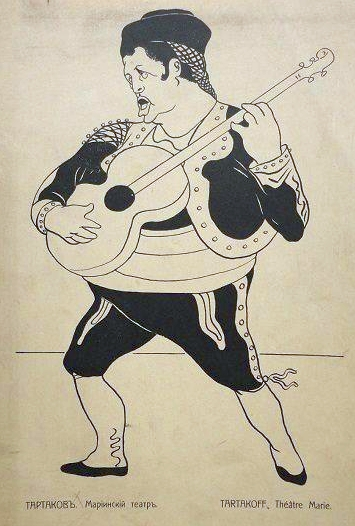 Русский оперный певец Иоаким Викторович Тартаков на карикатуре Поля Робера из альбома «Весь Петербург в карикатурах»